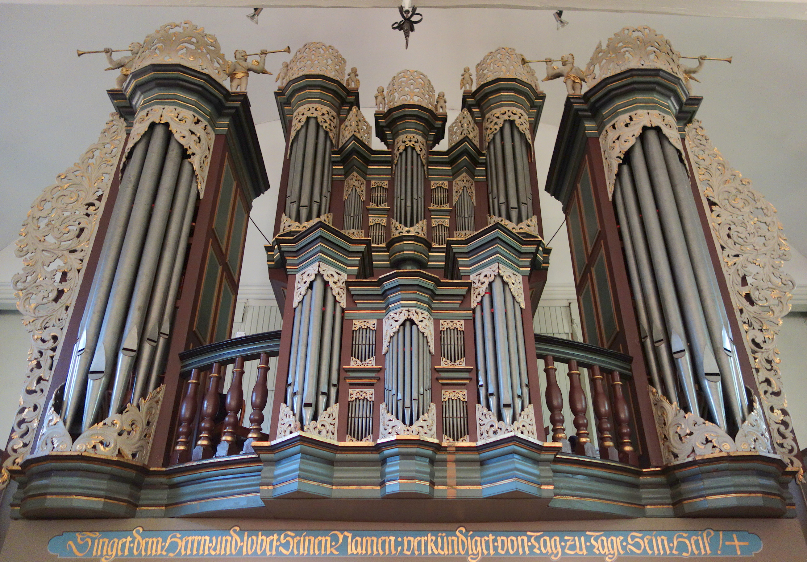 Orgel der St.-Liborius-Kirche (Bremervörde), Landkreis Rotenburg (Wümme), Mecklenburg-Vorpommern. Deutschland